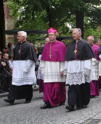 Kannunik Stanislas Louis van Outryve d'Ydewalle (aan de rechterzijde van de Aartsbisschop Willem Jacobus Eijk van Utrecht. Aan de linkerzijde zijn opvolger als pastoor van de Sint-Salvatorkathedraal, Kanunnik Jan Tilleman.